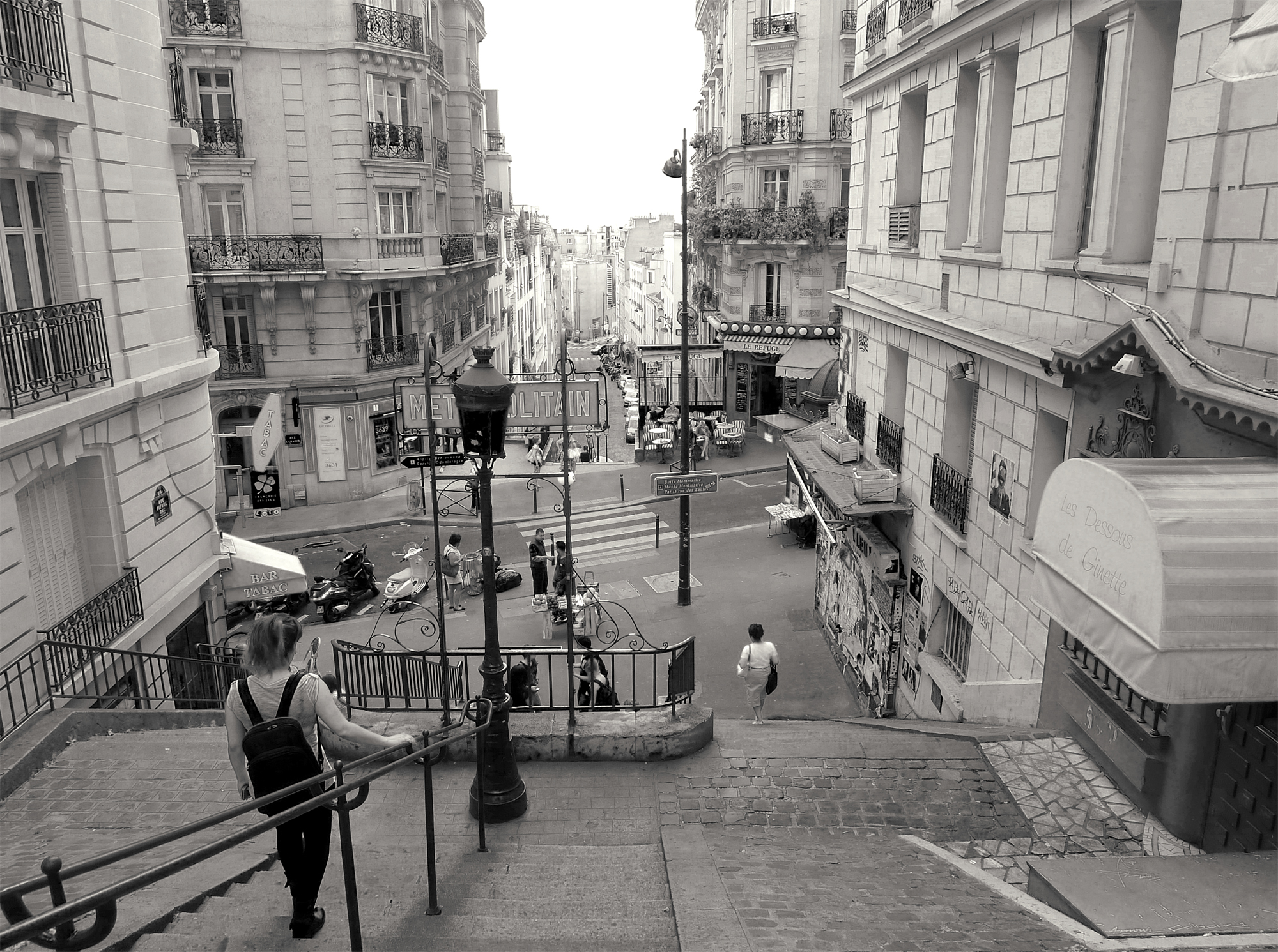 Rue Pierre-Dac - Paris XVIII